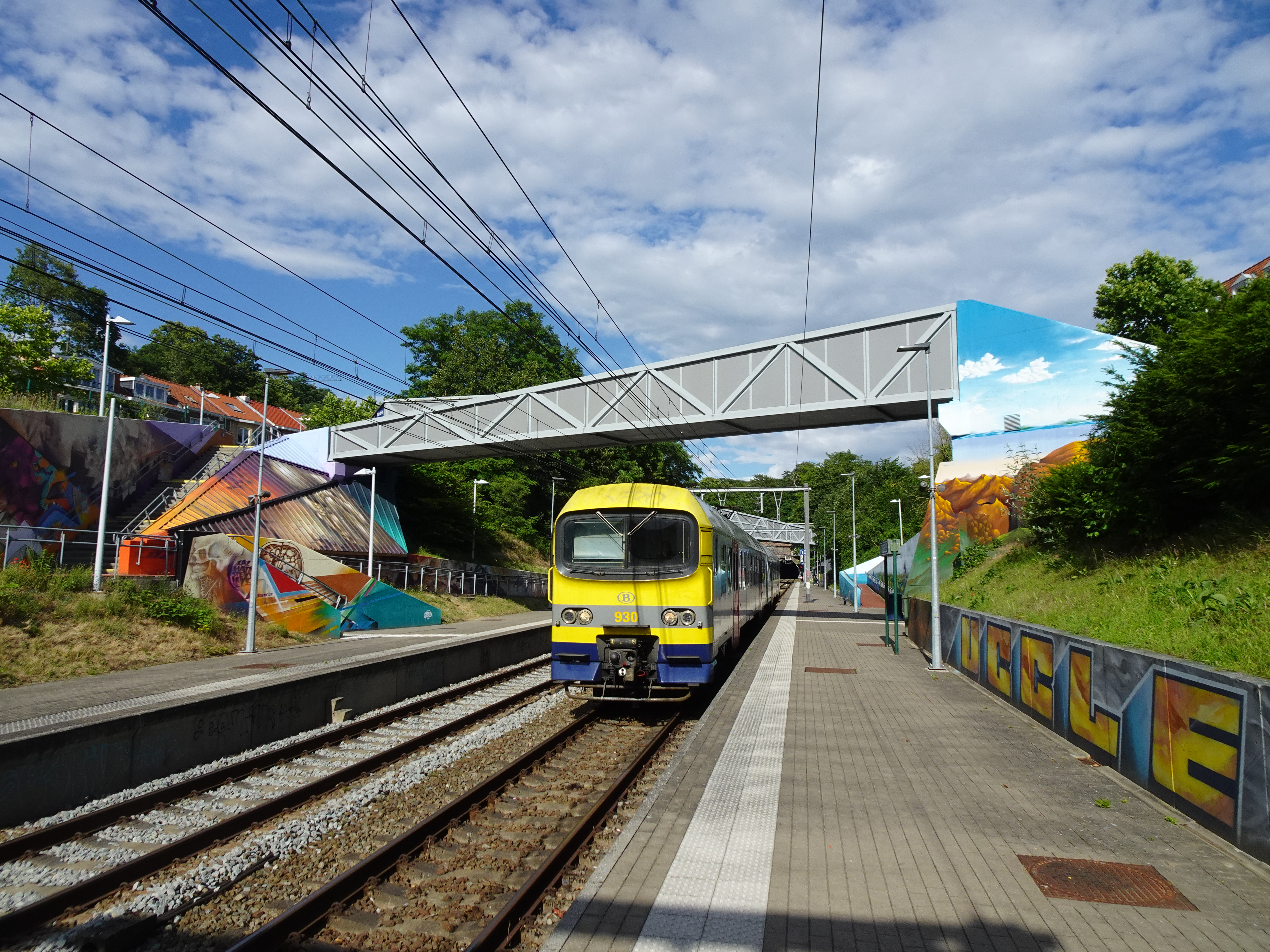 La 930, assurant le train S5 3388 (Malines - Hal - Grammont) démarre de la gare du Vivier d'Oie.